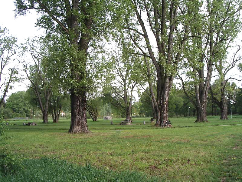 Fürth, Grillplatz zwischen Rednitz und Freibad, von SO (2004-05-11). Mit Graupappeln bestanden.